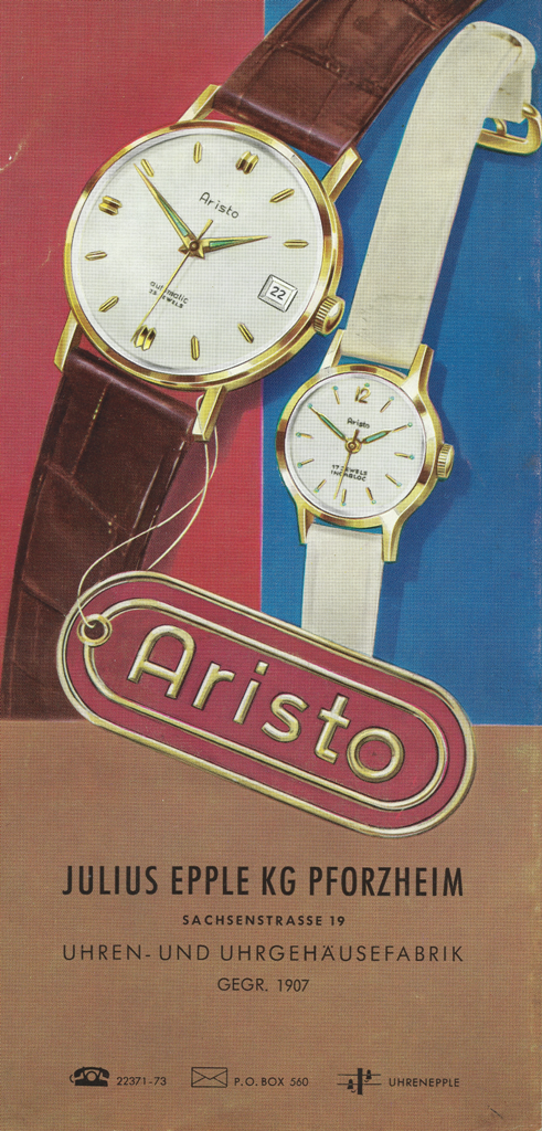 Aristo Prospekt aus dem Archiv